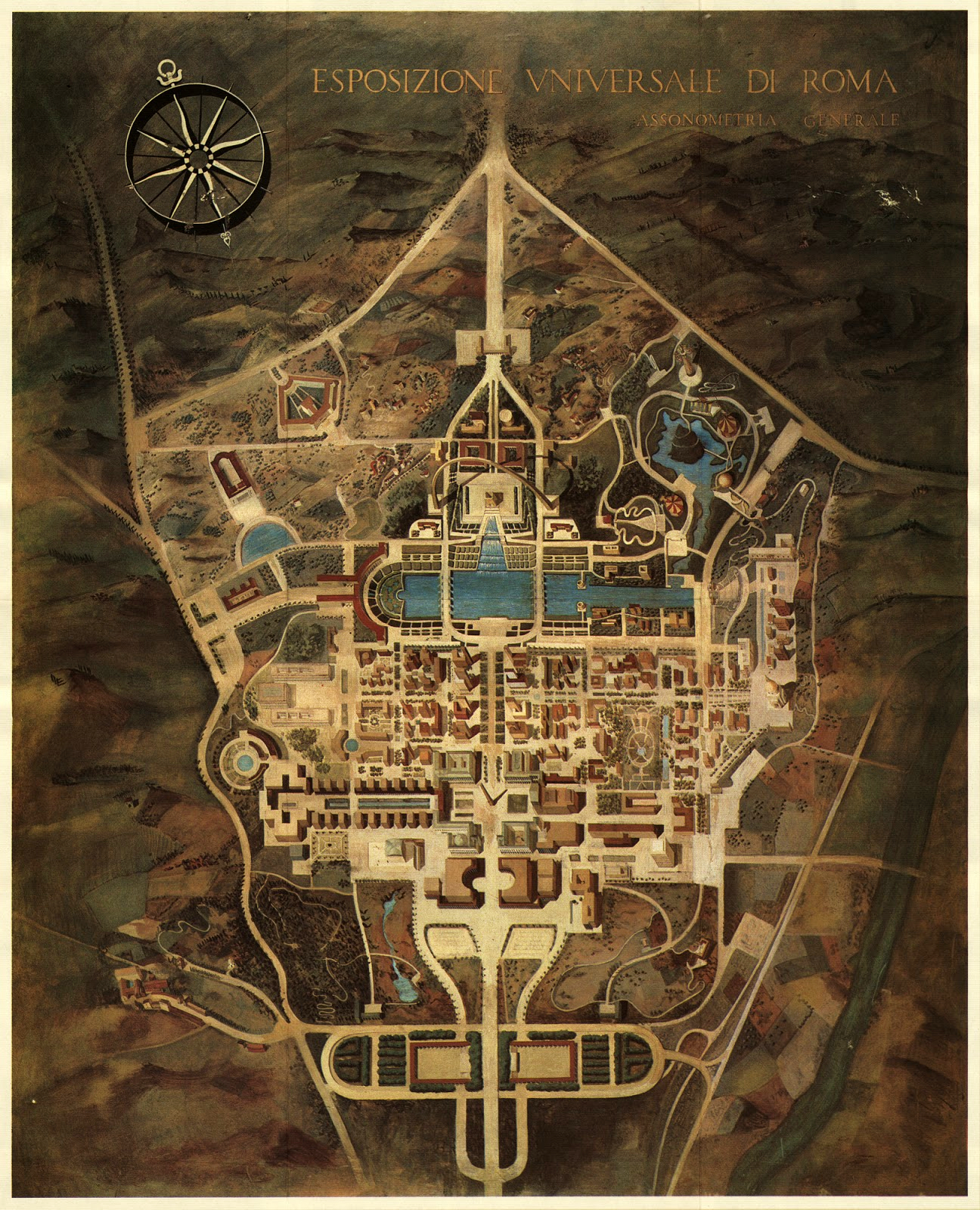 Planimetria generale dell'Esposizione Universale di Roma del 1942.